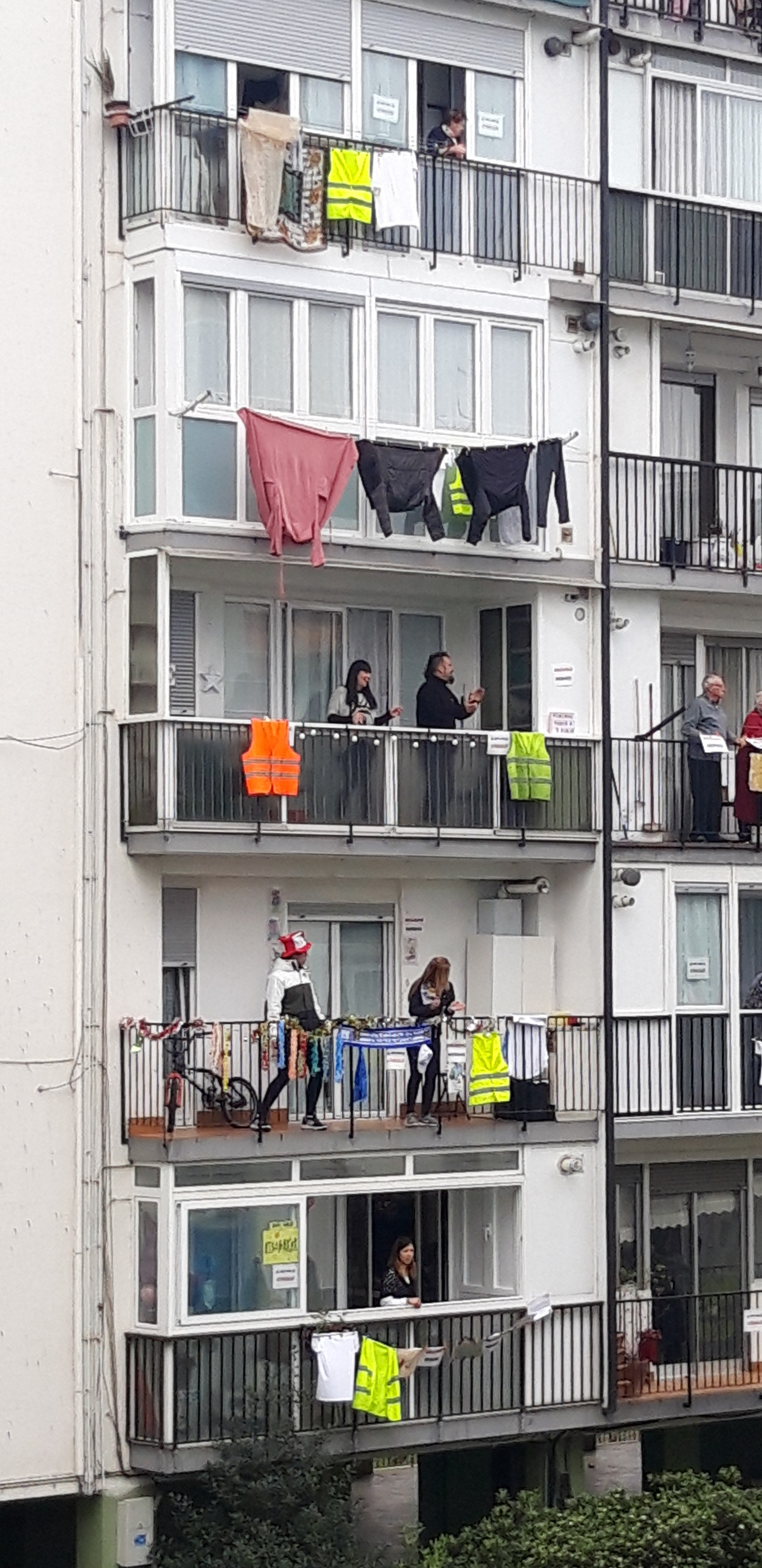 Koronabirusaren konfinamendua Lasarteko balkoietan musika dantzatzen